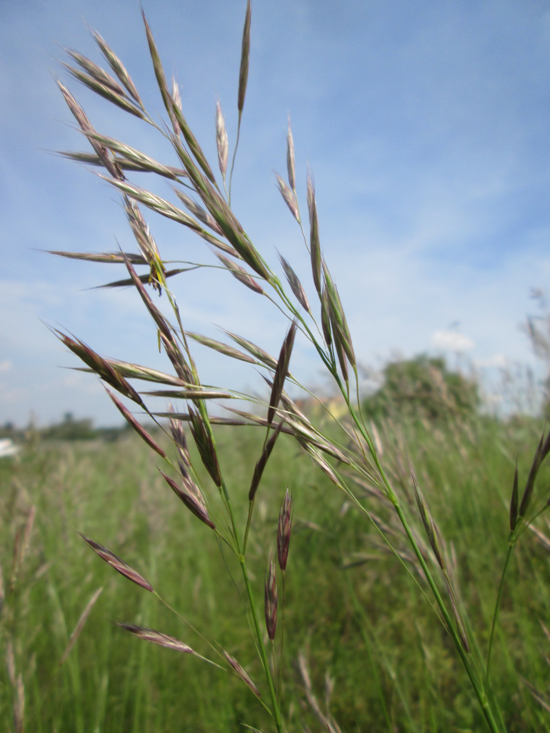 Aufrechte Trespe (Bromus erectus) am Kraichbachdamm am Rand vom Landschaftsschutzgebiet „Hockenheimer Rheinbogen“